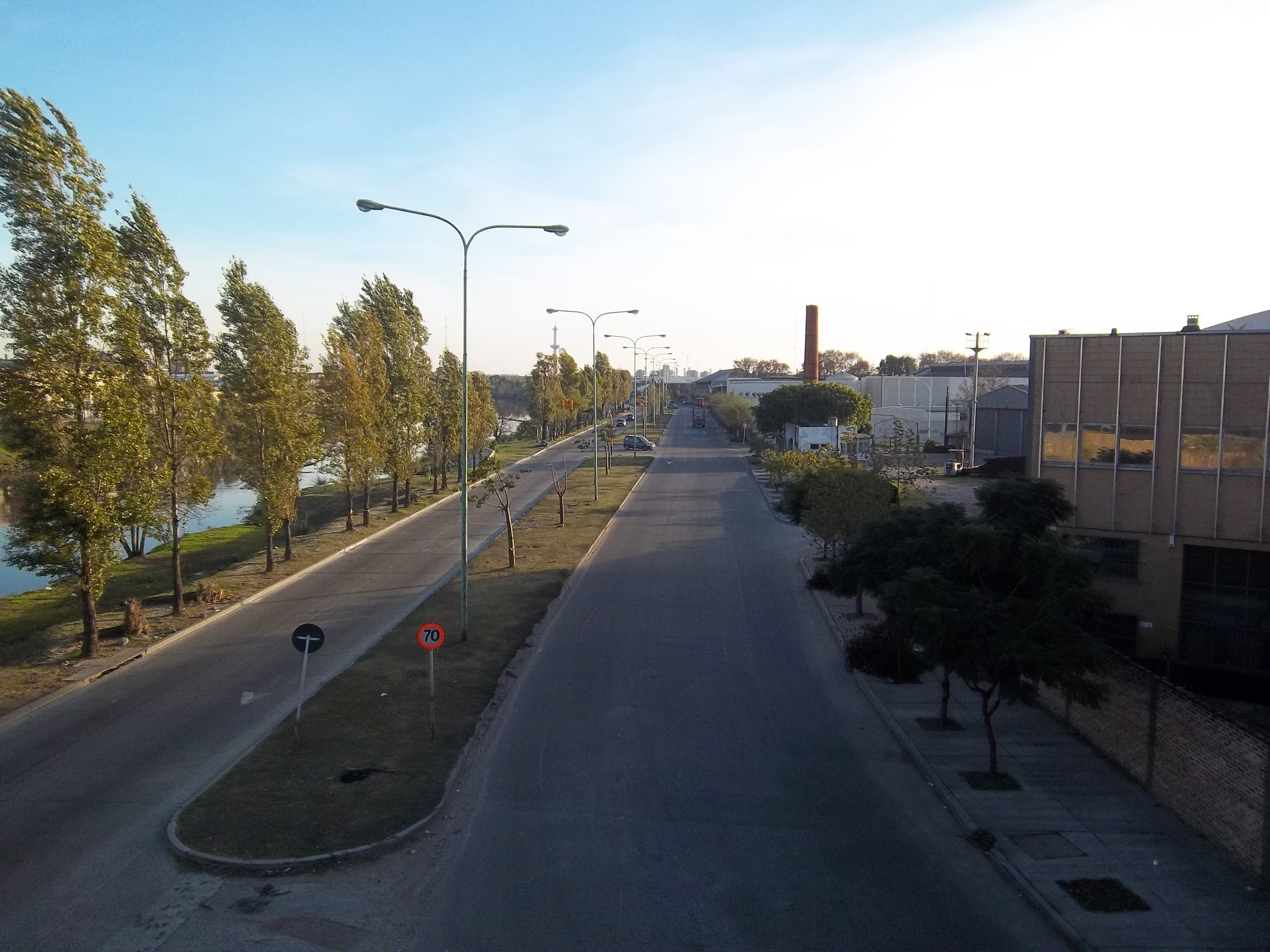 Avenida 27 de Febrero desde el Puente Alsina en el barrio de Nueva Pompya, ciudad de Buenos Aires, Argentina. A la izquierda, el Riachuelo.